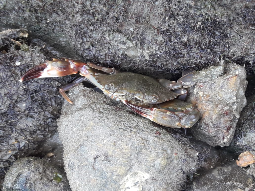 A foto apresenta o crustácceo Callinectes sp encontrado na praia do Aracá em São Sebastião, SP, Brasil. O animal é também conhecido siri azul e aqui está apresentado em seu habitat natural.